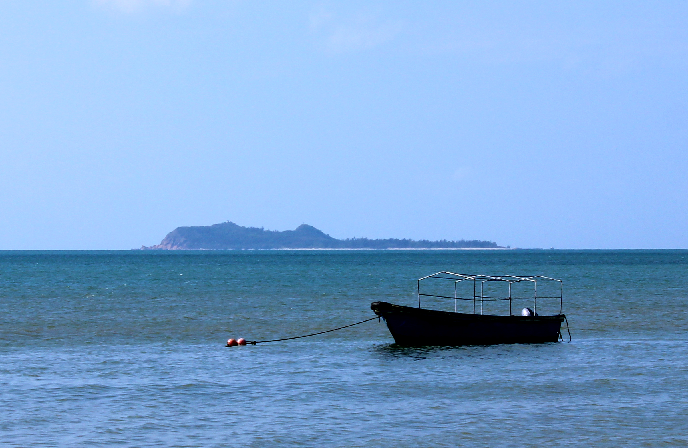 海南三亚湾中的东瑁洲。